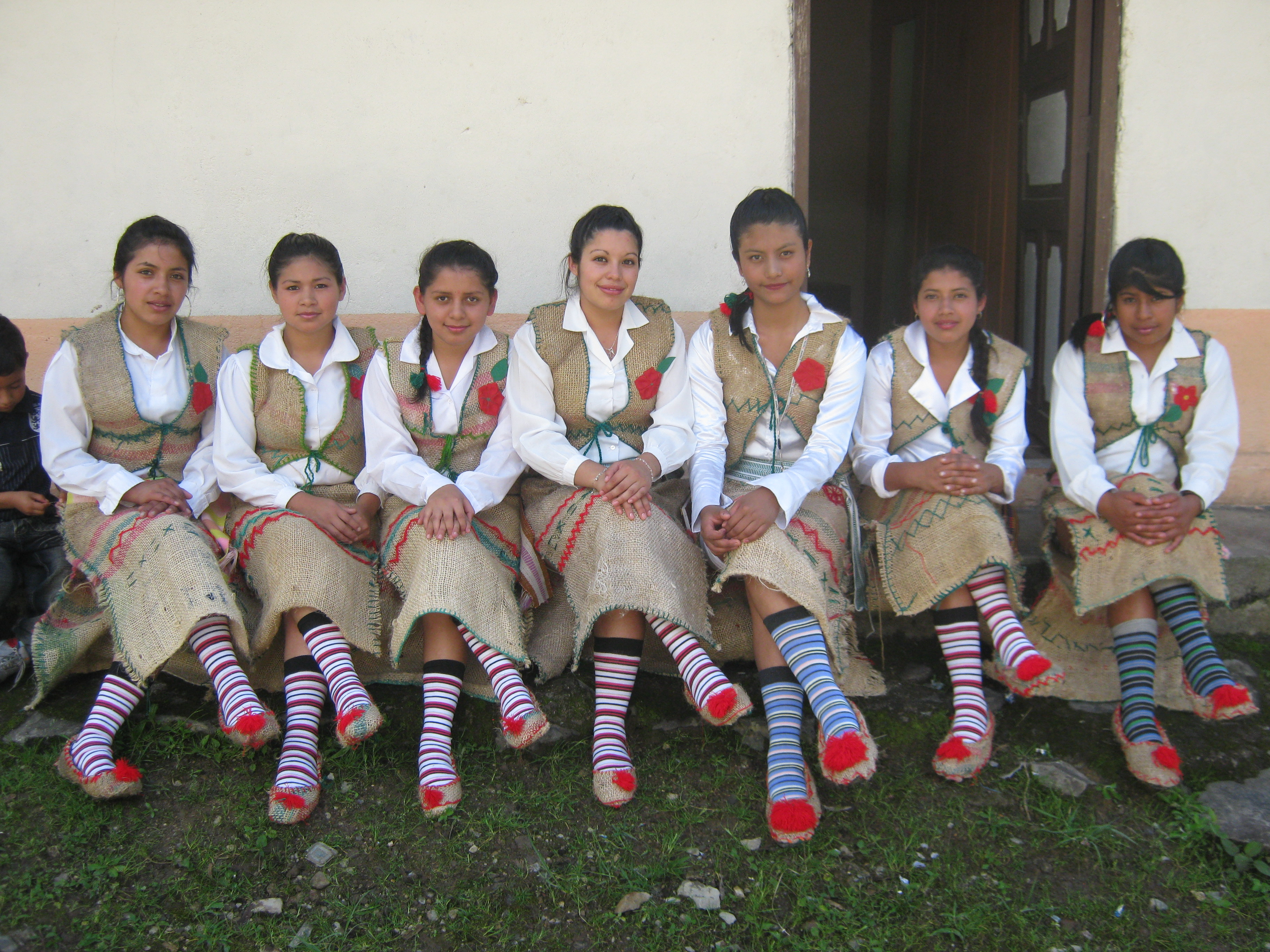 Carnavales de Negros y Blancos en Monopamba